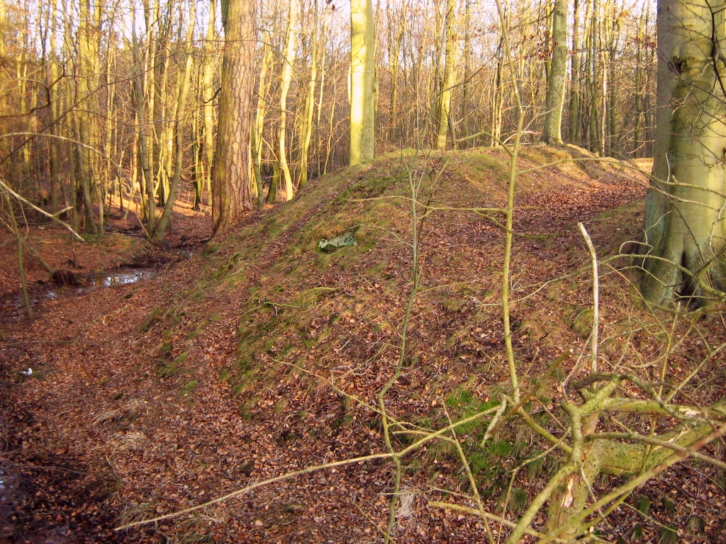 Spätmittelalterlicher Turmhügel im Gelbensander Forst (Landkreis Bad Doberan, Mecklenburg-Vorpommern).